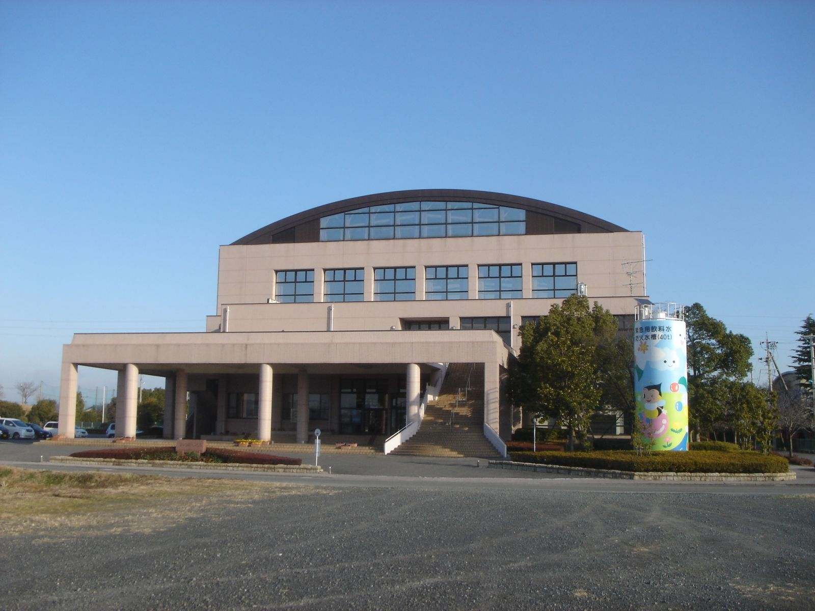 （安八町総合体育館）,Anpachi,Gifu,Japan(岐阜県安八町)で撮影。